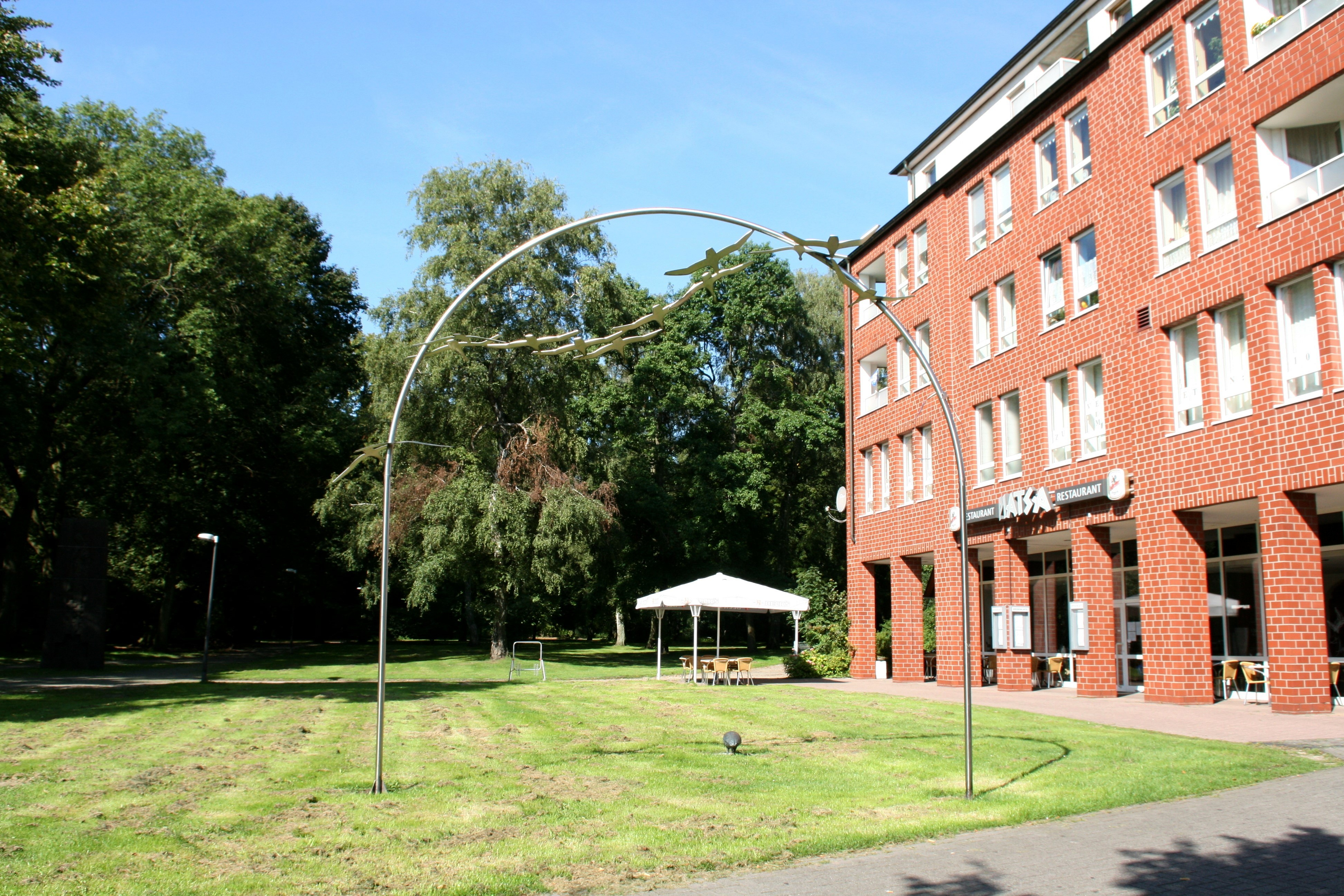 „Gänsebogen“ von Wolfgang Lamché am Rande des Alten Friedhofs, Ewaldstraße in Herten